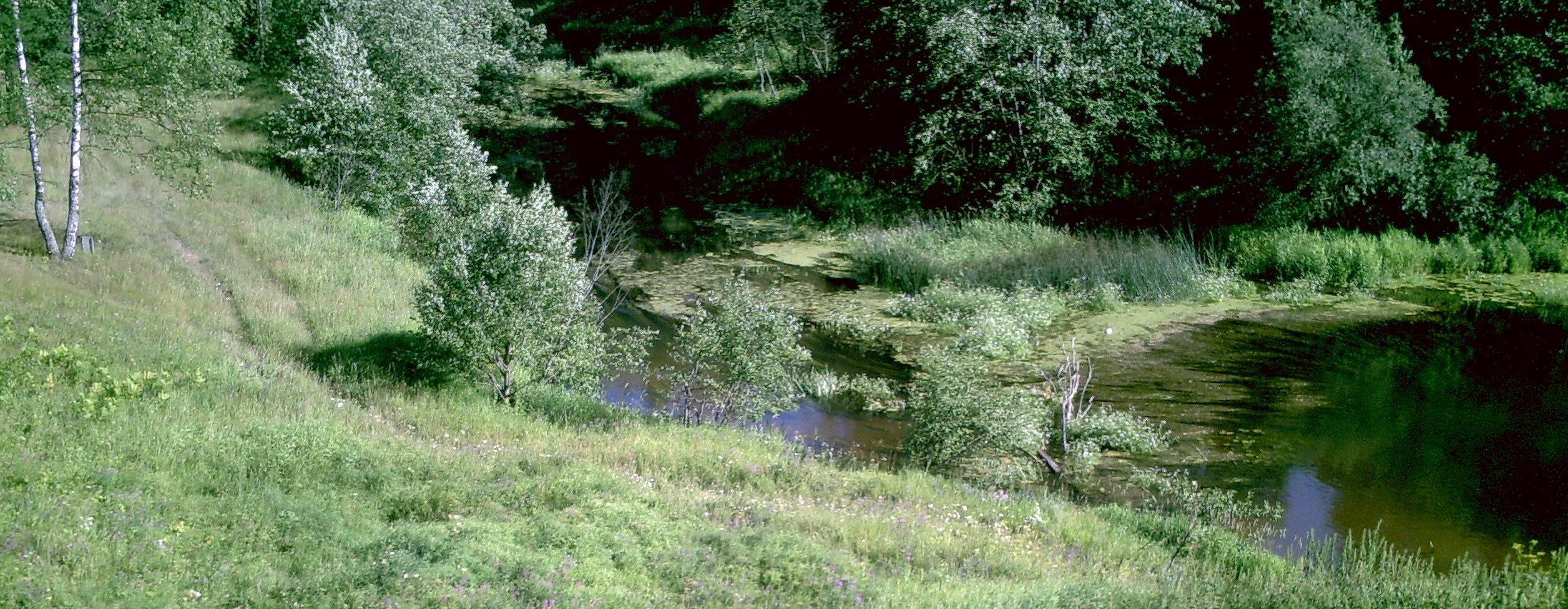 Нерль рядом с ж/д Москва-Ярославль